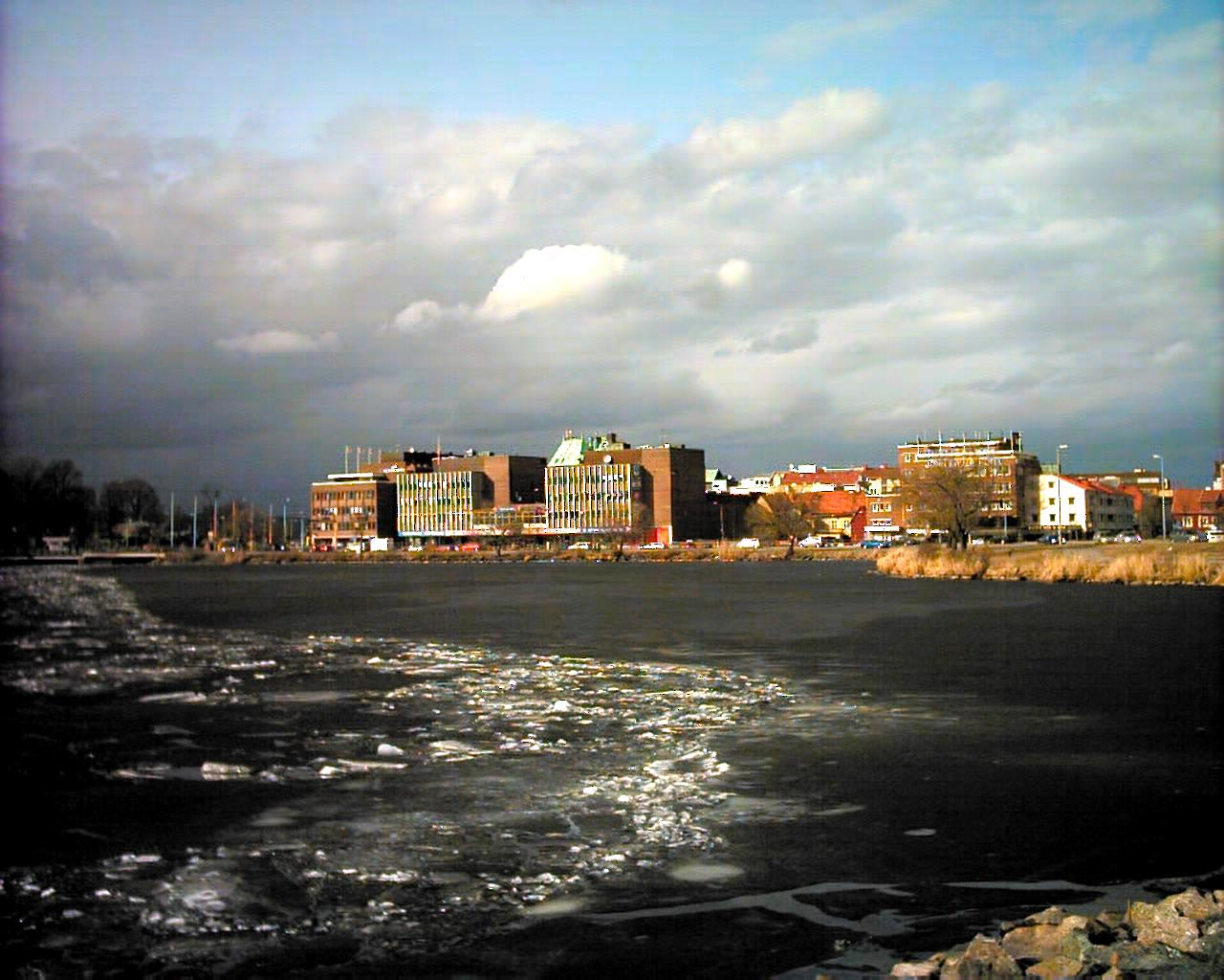 Centrala Jönköping. I bakgrunden kanalen, byggnaderna vid Hoppets torg och John Bauer hotell. Photo taken by User:Boivie in Jönköping 7 April 2006